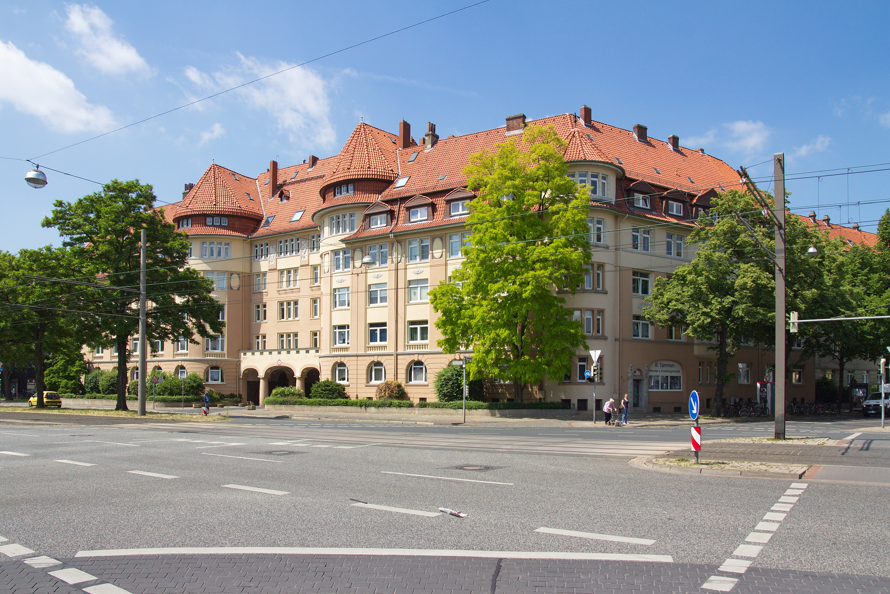 Spannhagengarten-Podbielskistraße (Hannover), Niedersachsen, Deutschland.